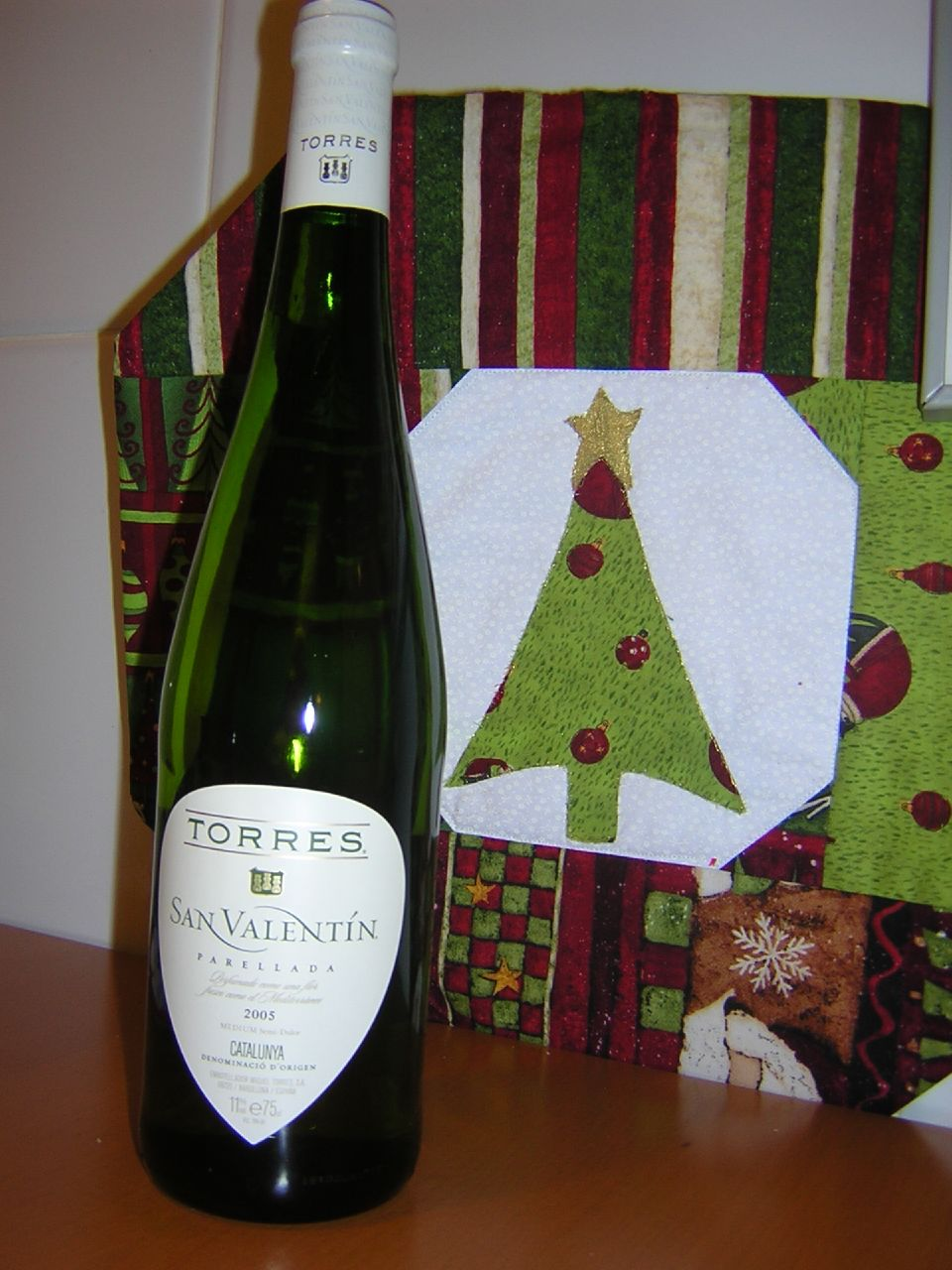 Vino Blanco Torres San Valentin